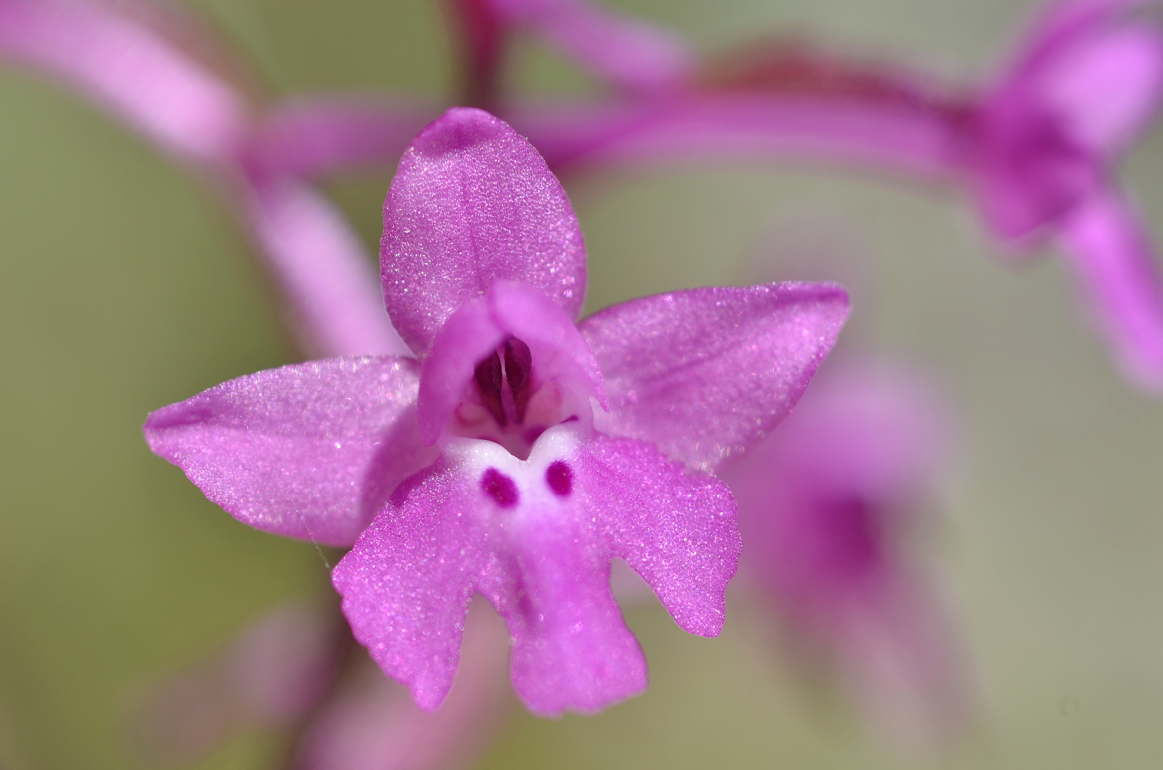 Orchis (Androrchis) quadripunctata